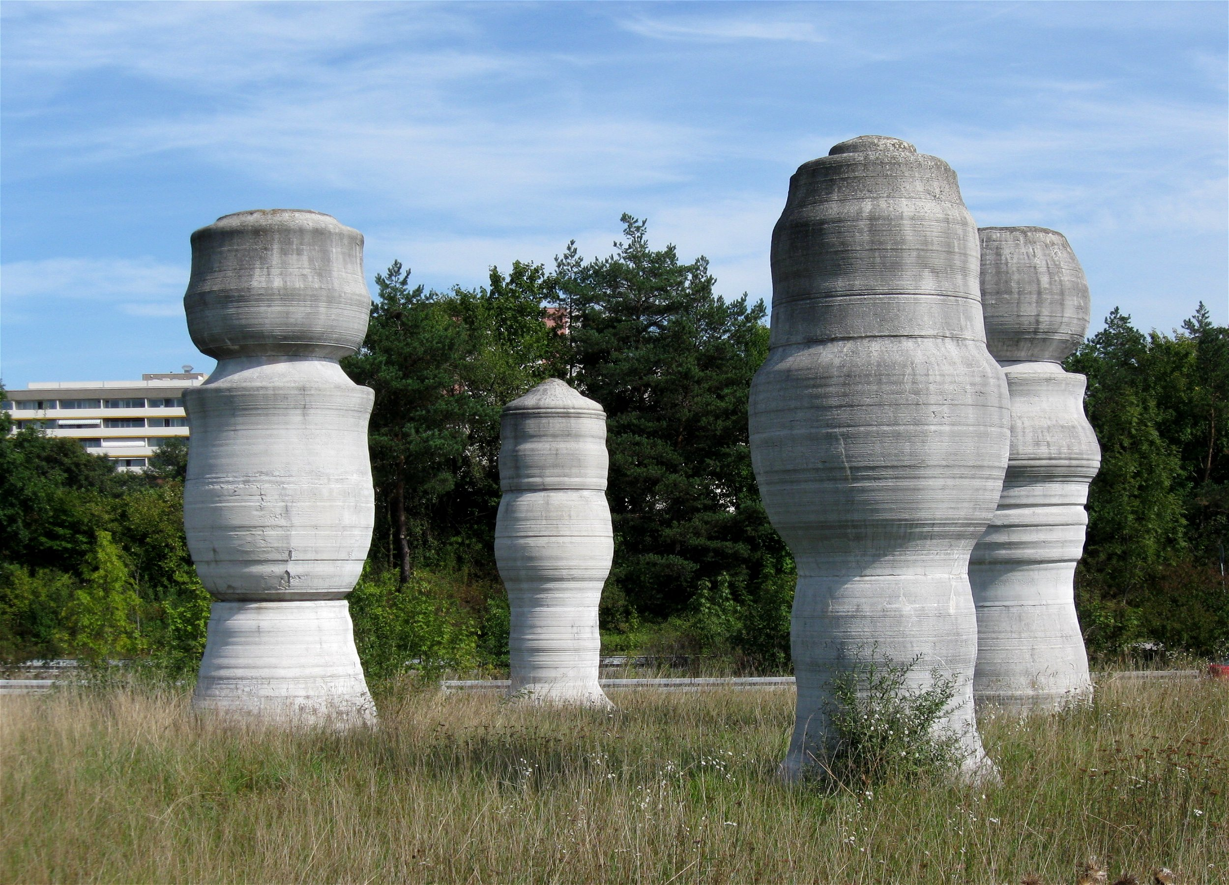 Jai Young Park: „Nur der Mensch ist der Ort der Bilder“, 1999, München-Neuperlach